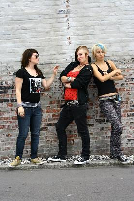 Det danske pige-punkband Niels På Dåse